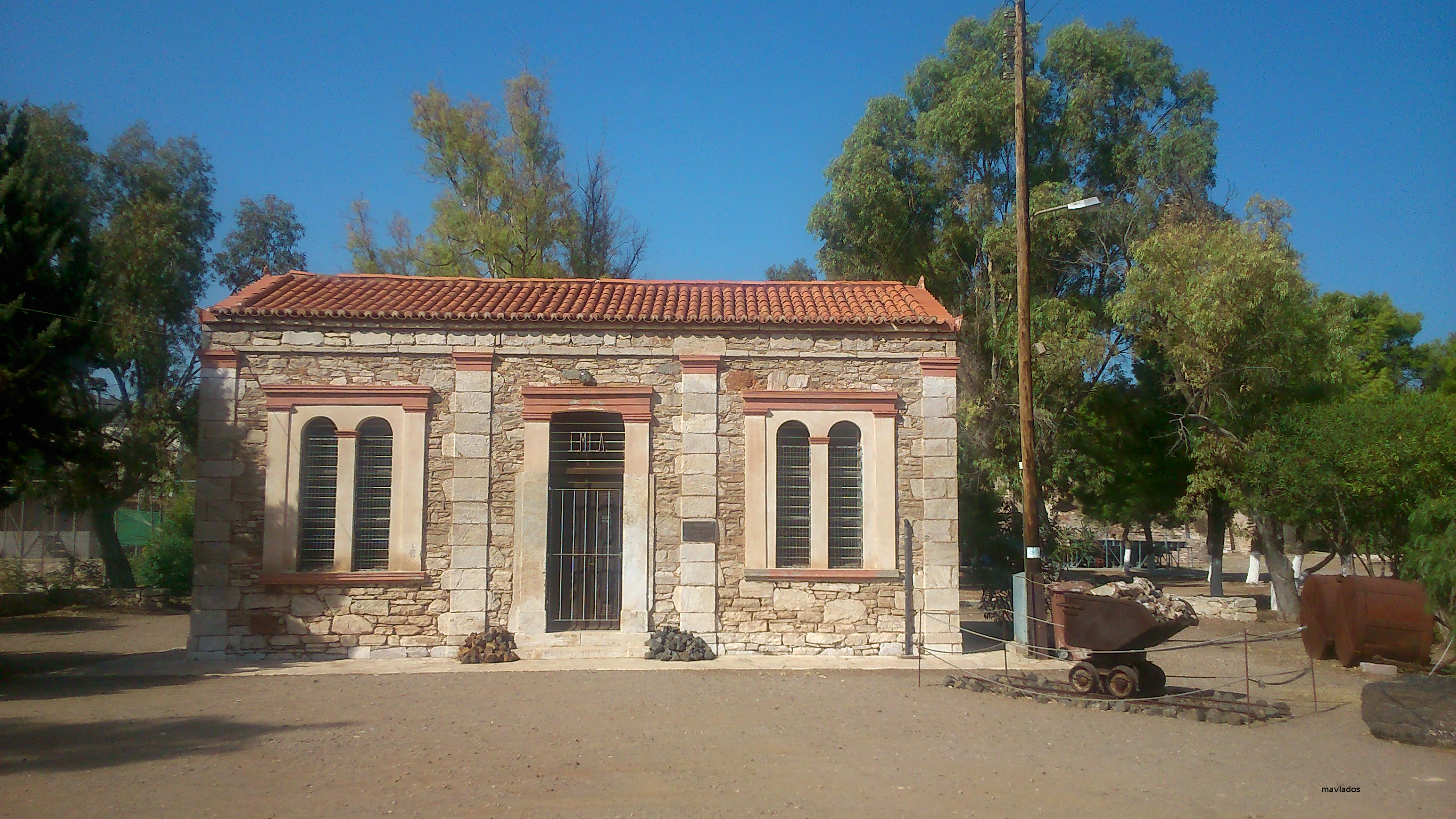 Το Ορυκτολογικό Μουσείο Λαυρίου